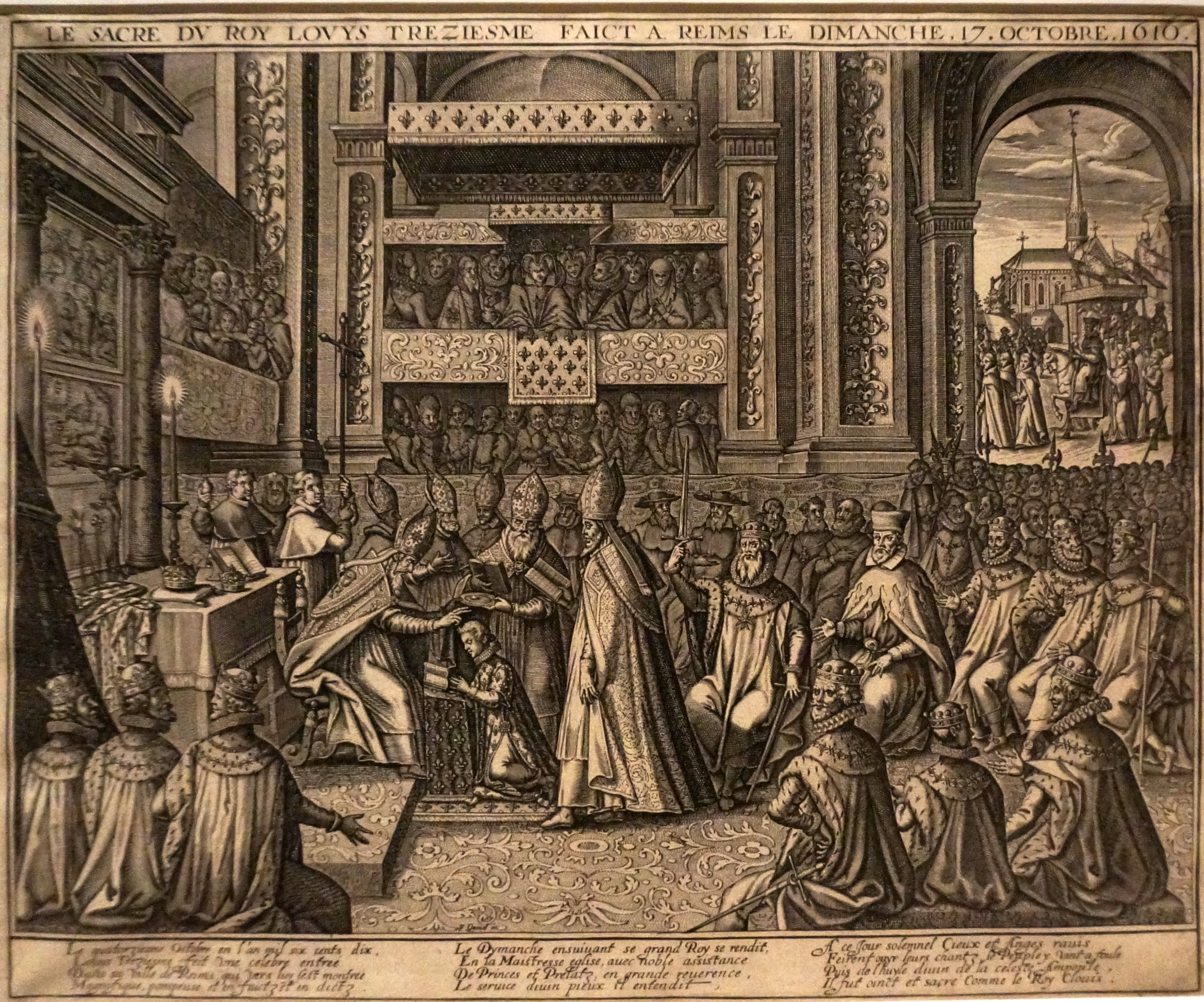 Lors de l' exposition Sacres Royaux, de Louis XIII à Charles.